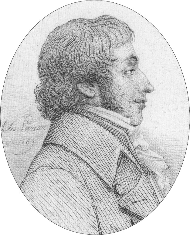 Guillaume-Alexandre_Tronson_Ducoudray, avocat et élu du peuple, mort en déportation.